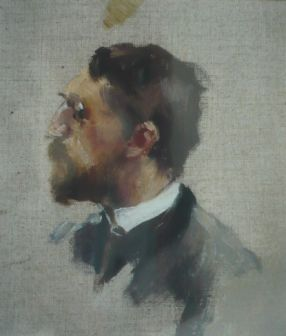 Self-portrait